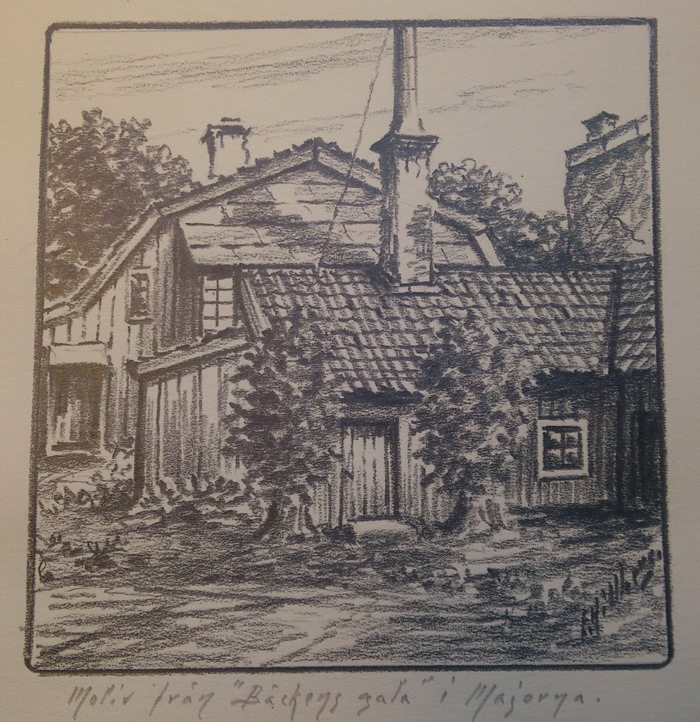 Kolteckning av Einar Hillberg föreställande Bäckens gata i Majorna Göteborg